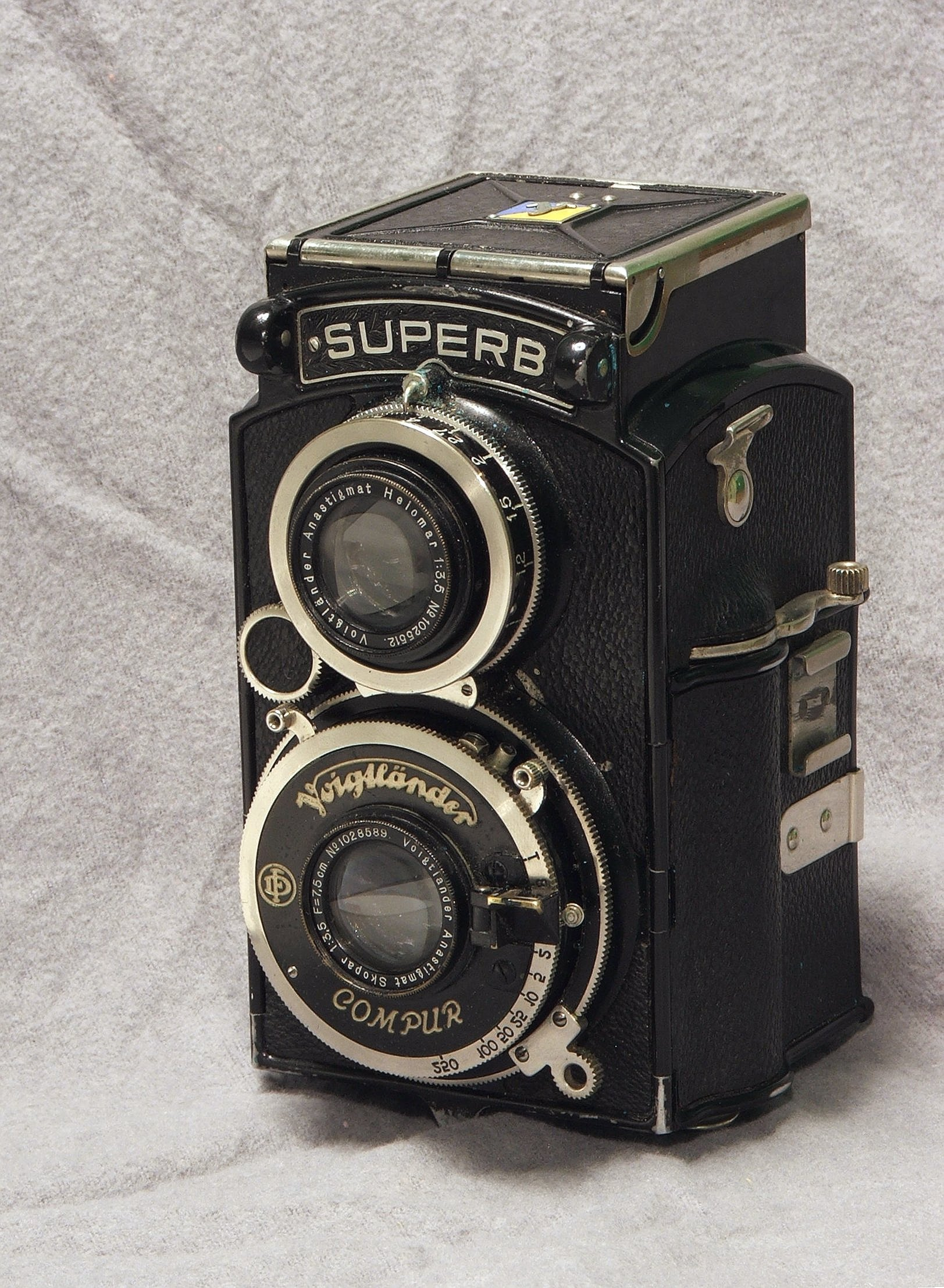 A "Voigtländer Superb" from 1935